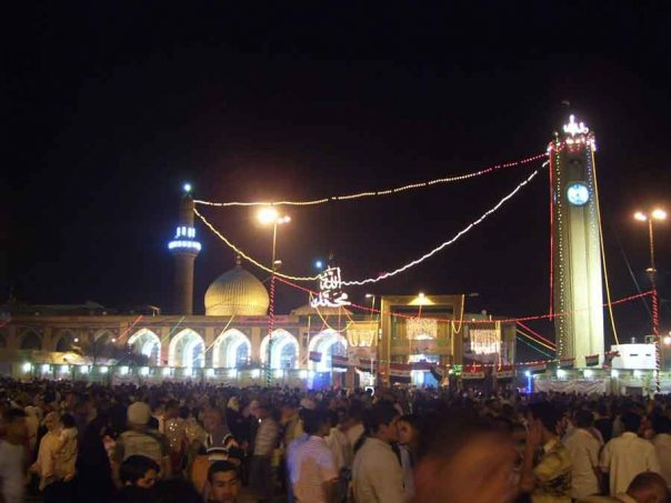 Abu Hanifa Mosque